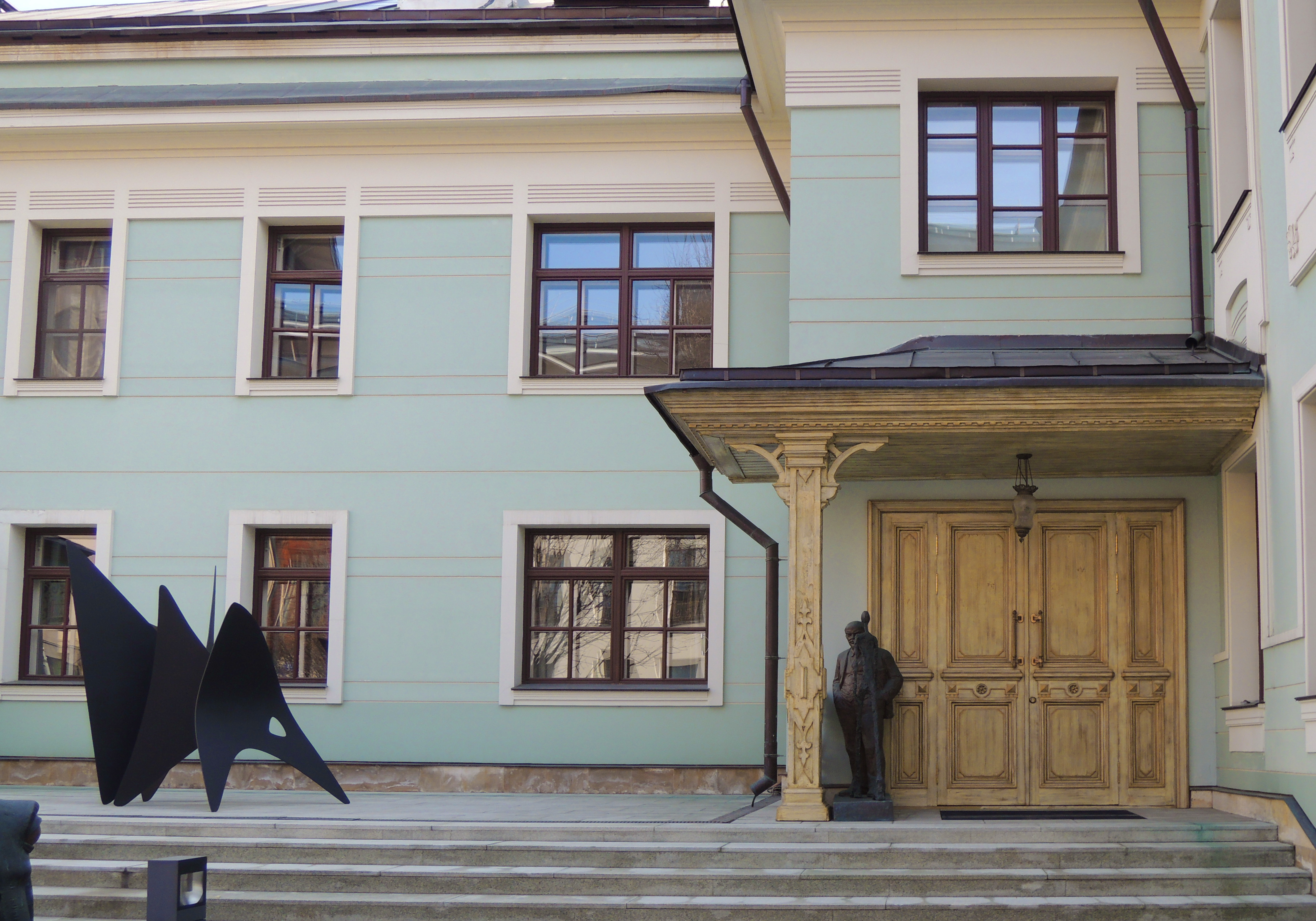 Вид на дом 5 по Молочному переулку